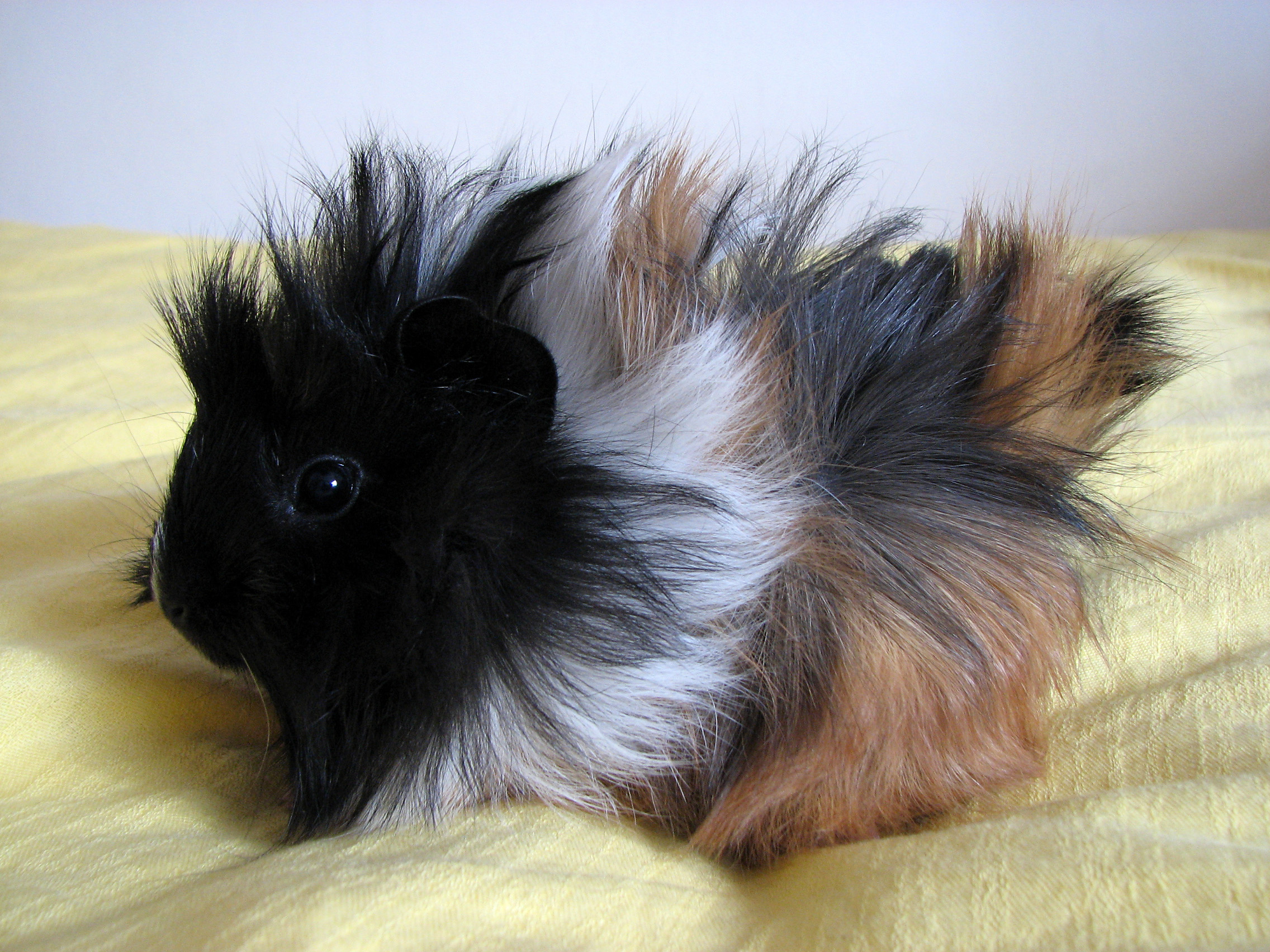 Ognjic.